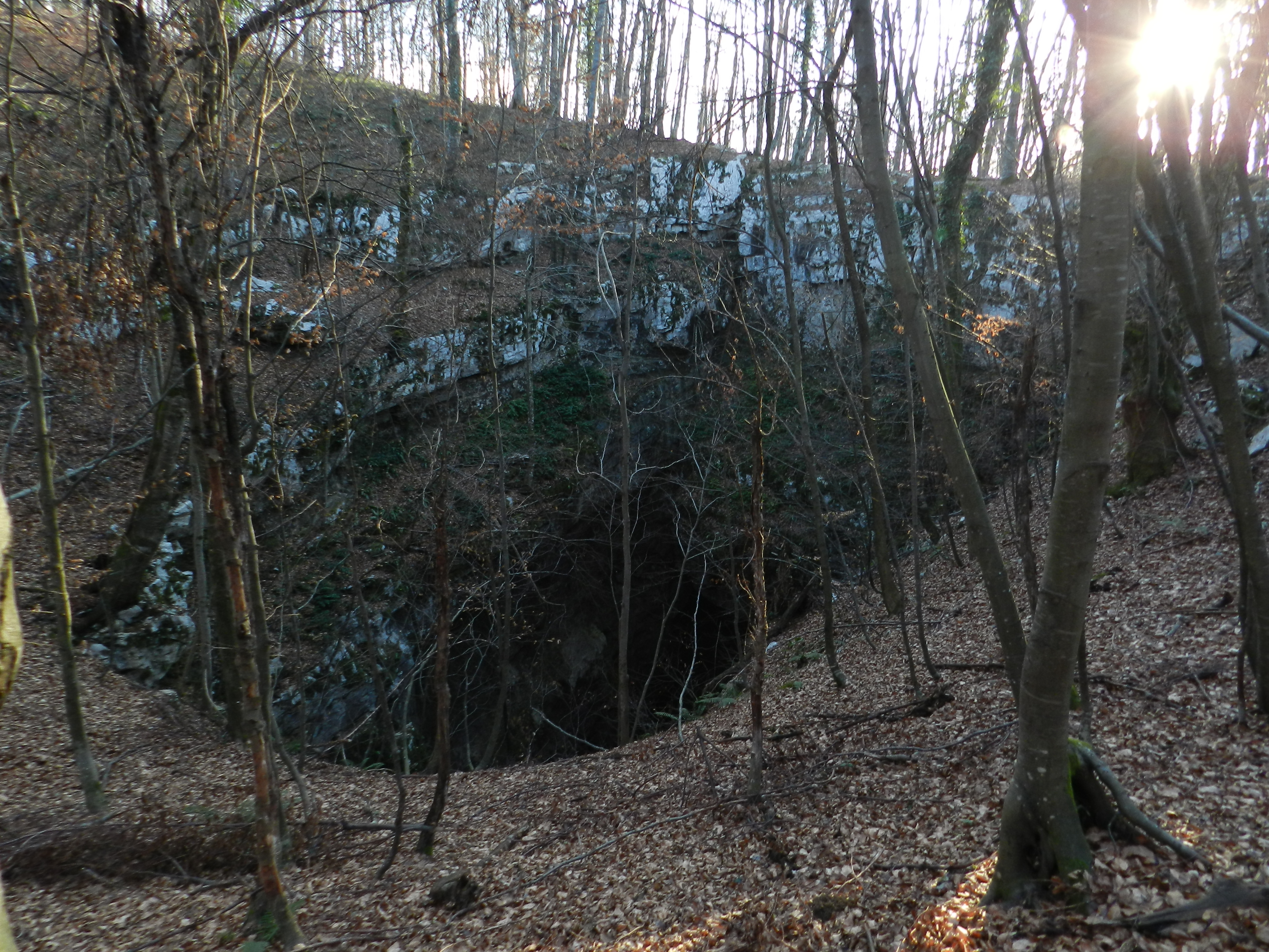 Vhod v jamo Zjot na Sebetihu